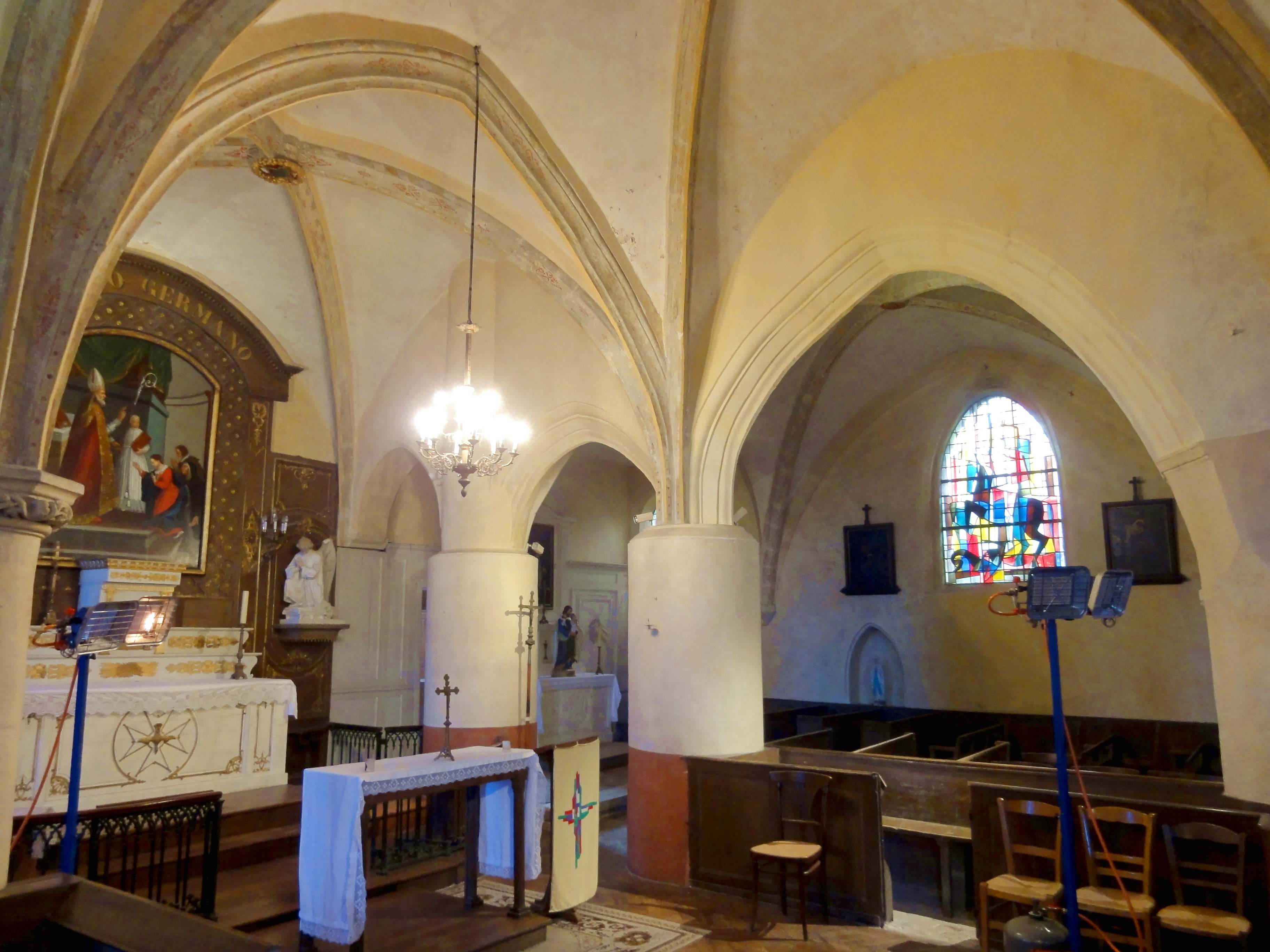 Intérieur de l'église - voir titre.